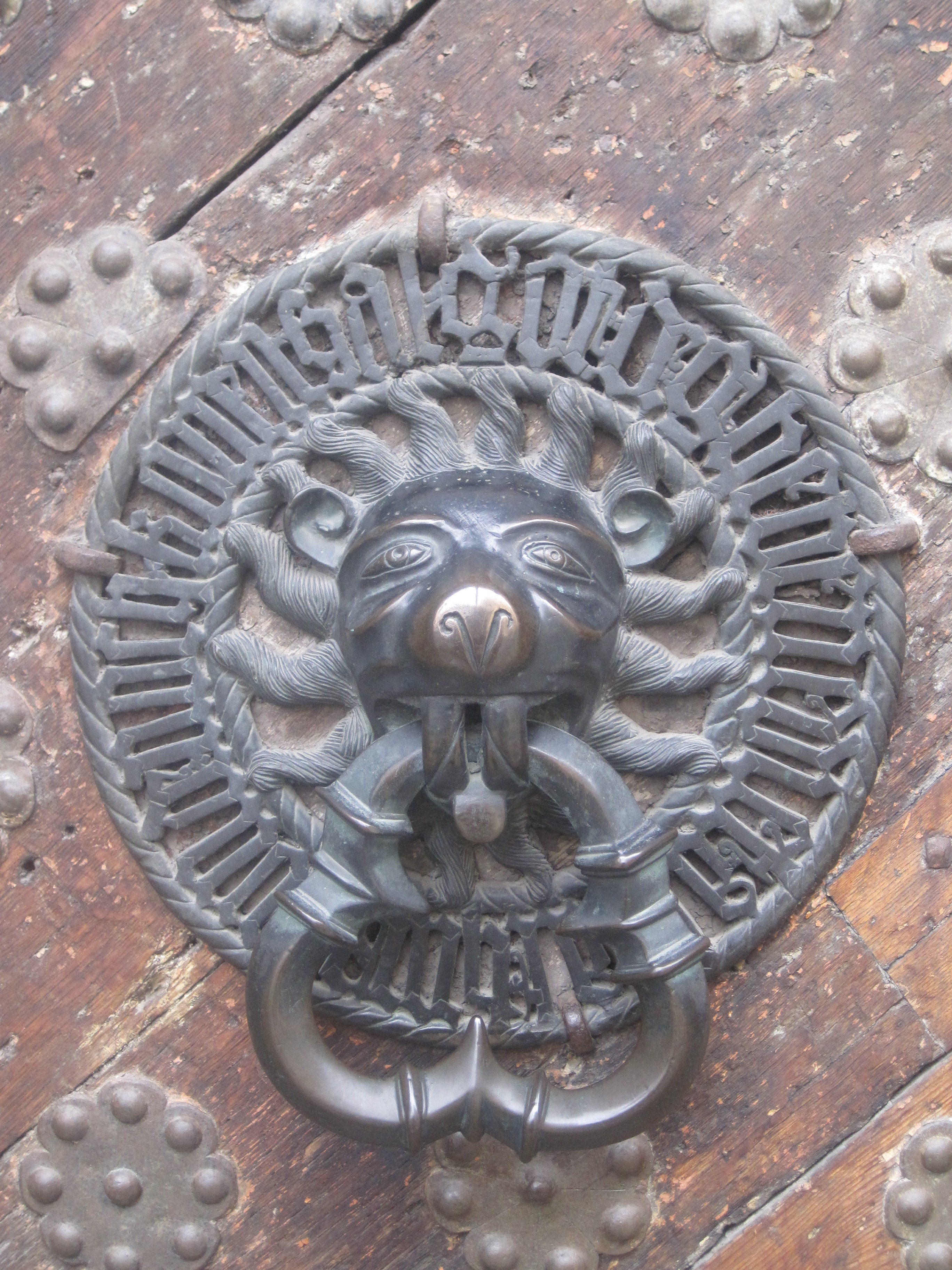 Eesti Ajaloomuuseumi koputi Tallinna vanalinnas